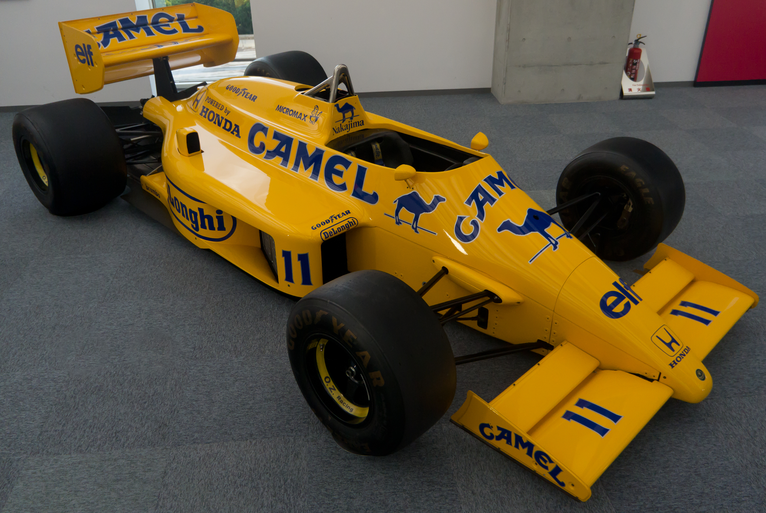 Lotus 99T (#11 Satoru Nakajima)